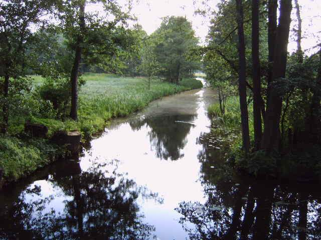 Uska Luke, Kanal im Spreewald Bild aufgenommen am 21.6.2006 durch Olaf Meister